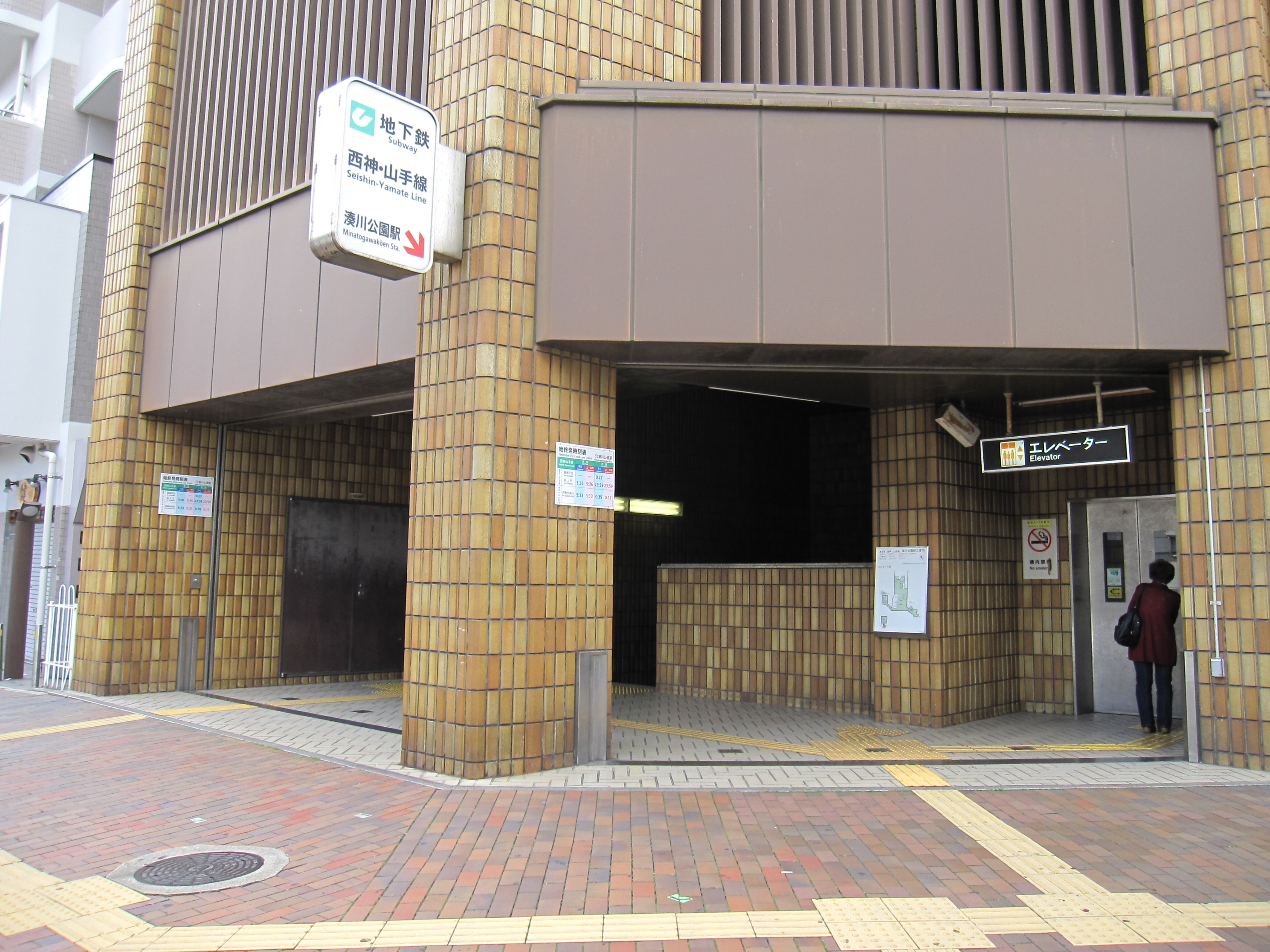 神戸市営地下鉄湊川公園駅